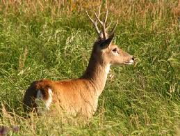 Venado de las Pampas obvservando